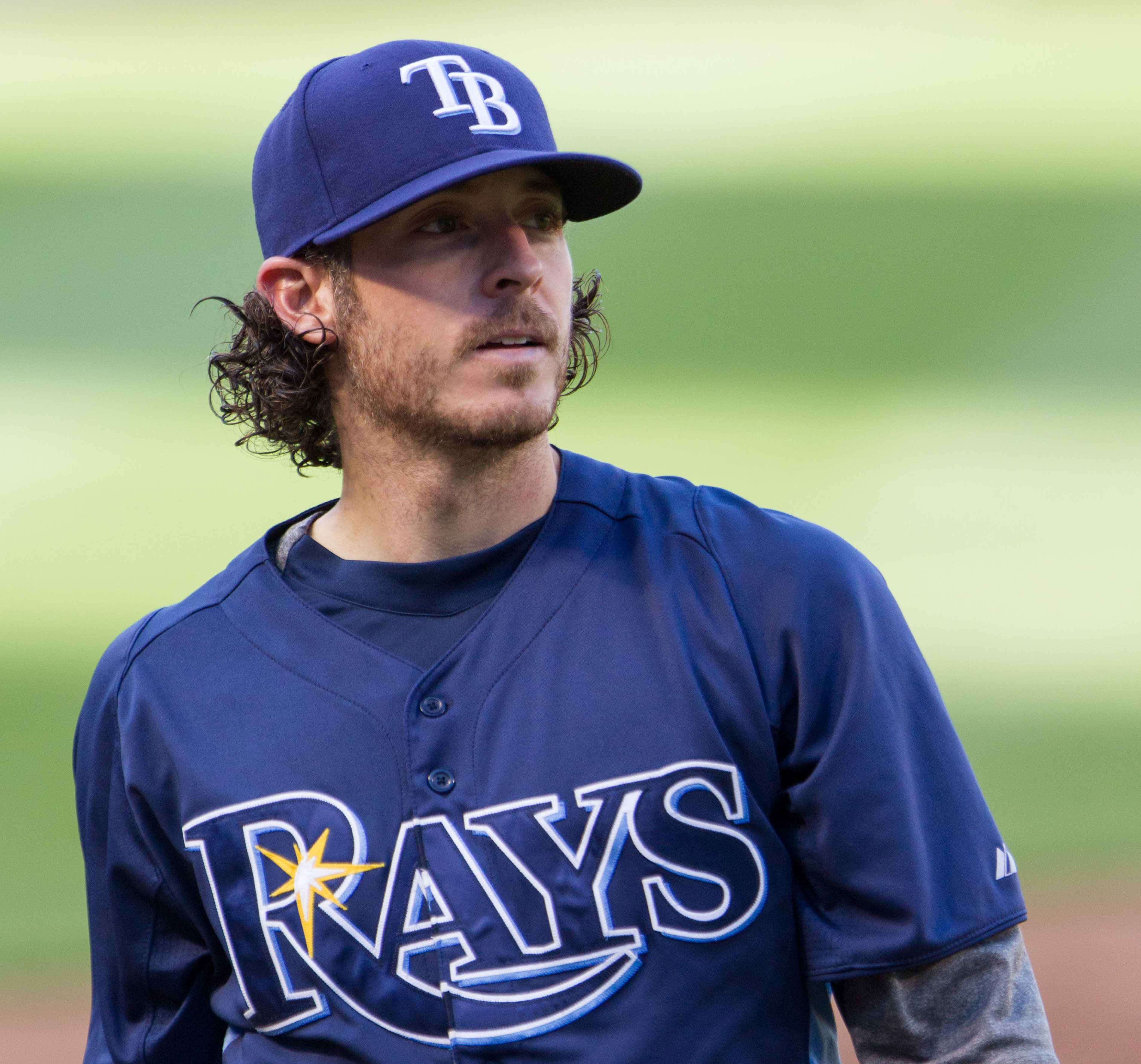 Will Rhymes